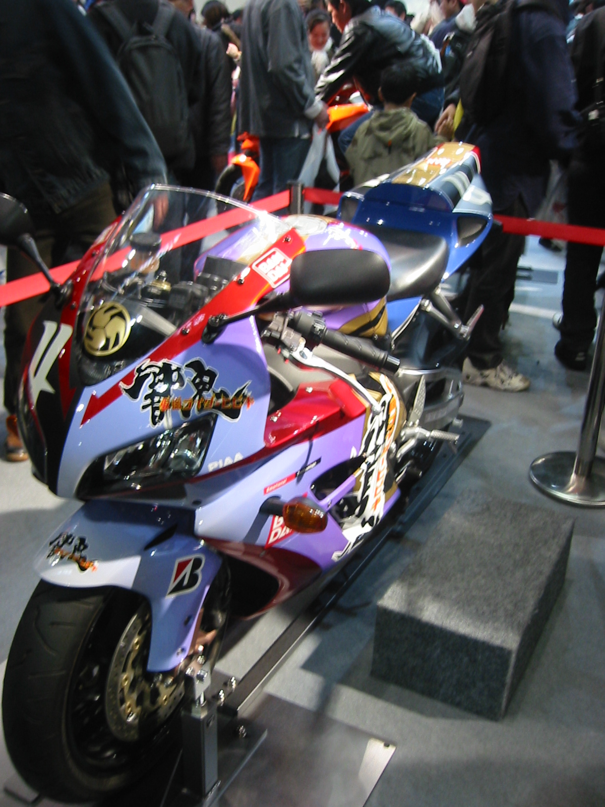 仮面ライダー響鬼バイク